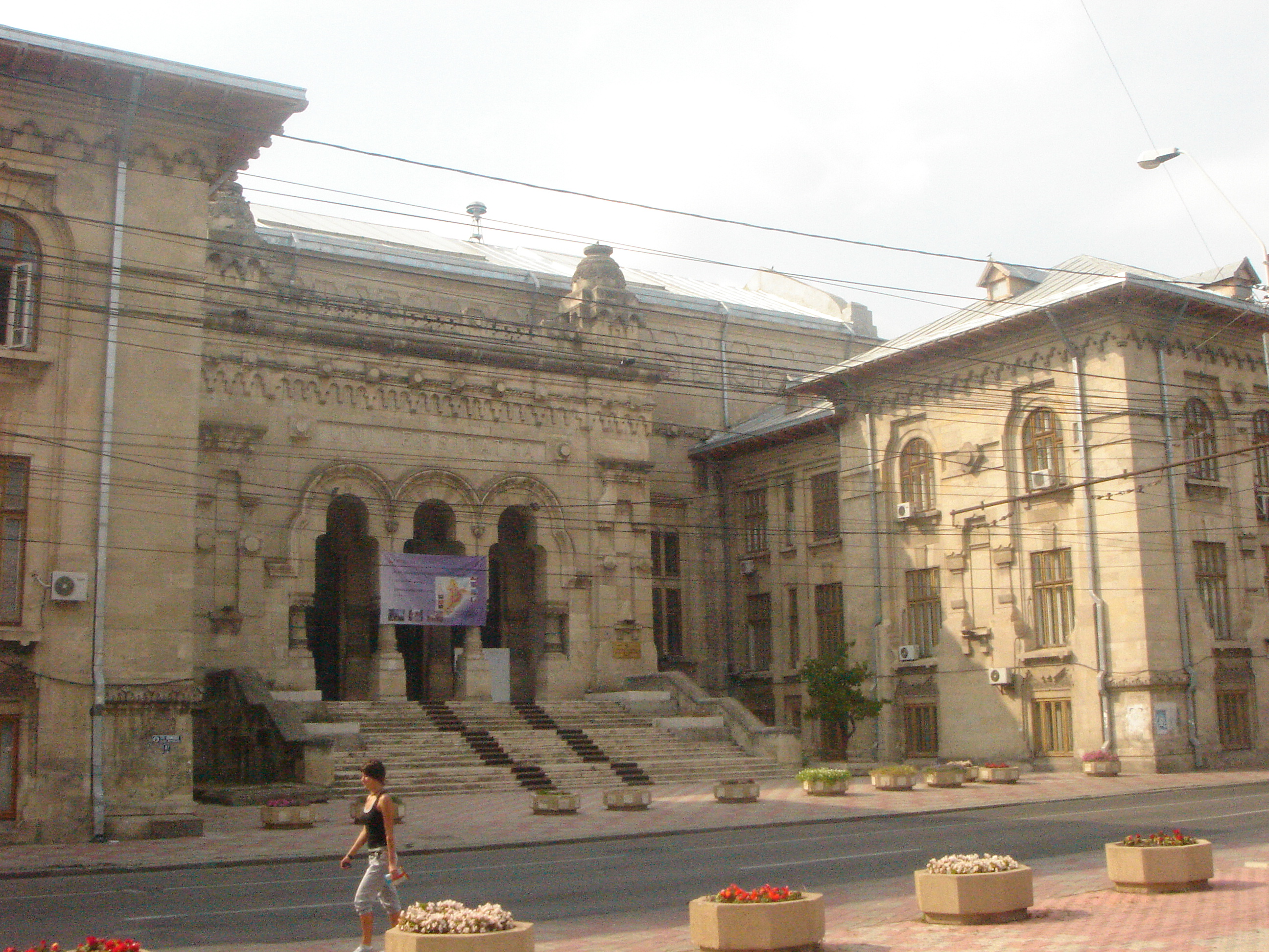 Palatul de Justiție, azi rectoratul Universității "Dunărea de Jos", cunoscut si ca Universitatea Dunarea de Jos, pentru majoritatea cetatenilor tineri, este pe Strada Domneasca, vis-a-vis de Primaria Municipiului Galati. Una dintre cele mai impozante cladiri ale orasului de la Dunare.